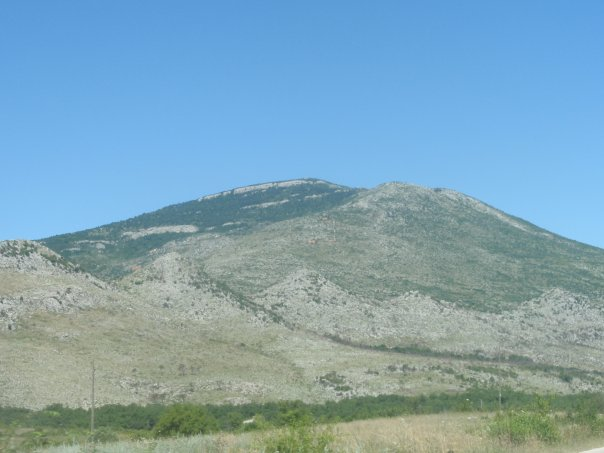 Planina Promina.